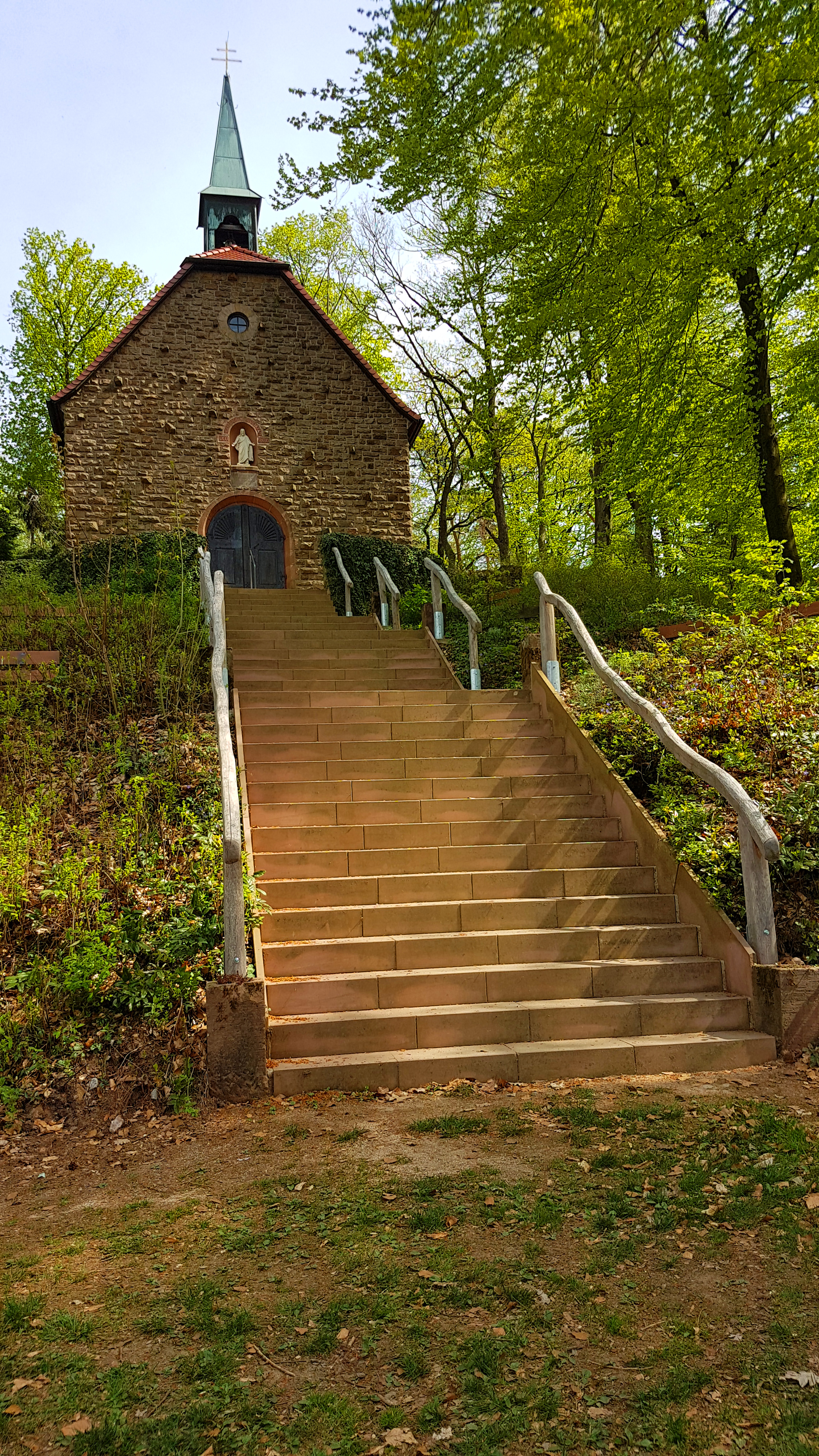 Walburgiskapelle Fürth-Weschnitz (Odenwald) Fronttreppe